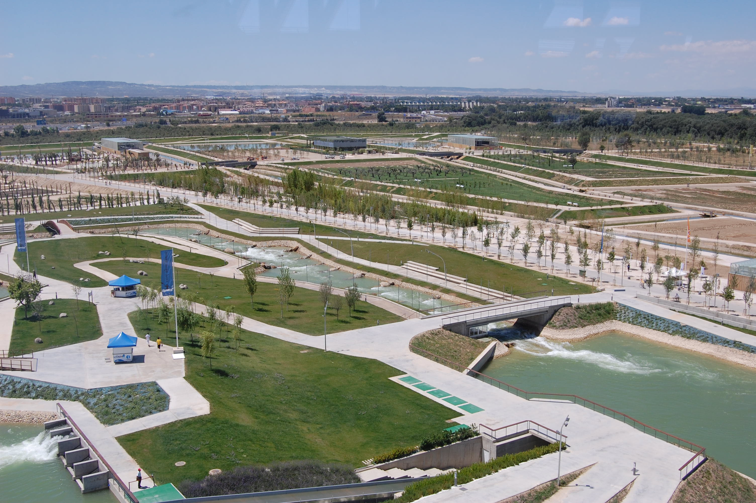 Vista desde la Torre del Agua del Parque del Agua Luis Buñuel.